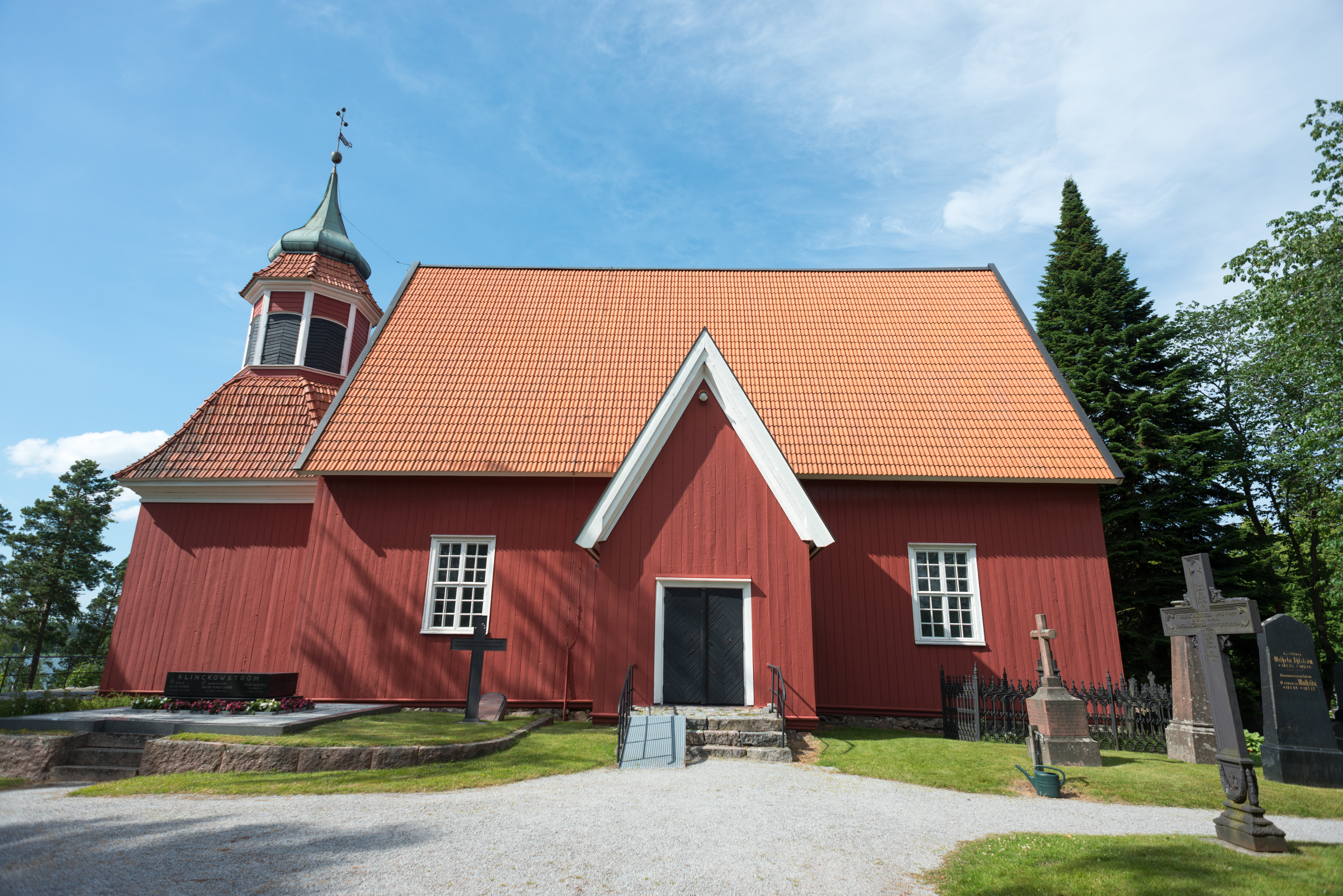 Angelniemen kirkko Angelniemellä Salossa